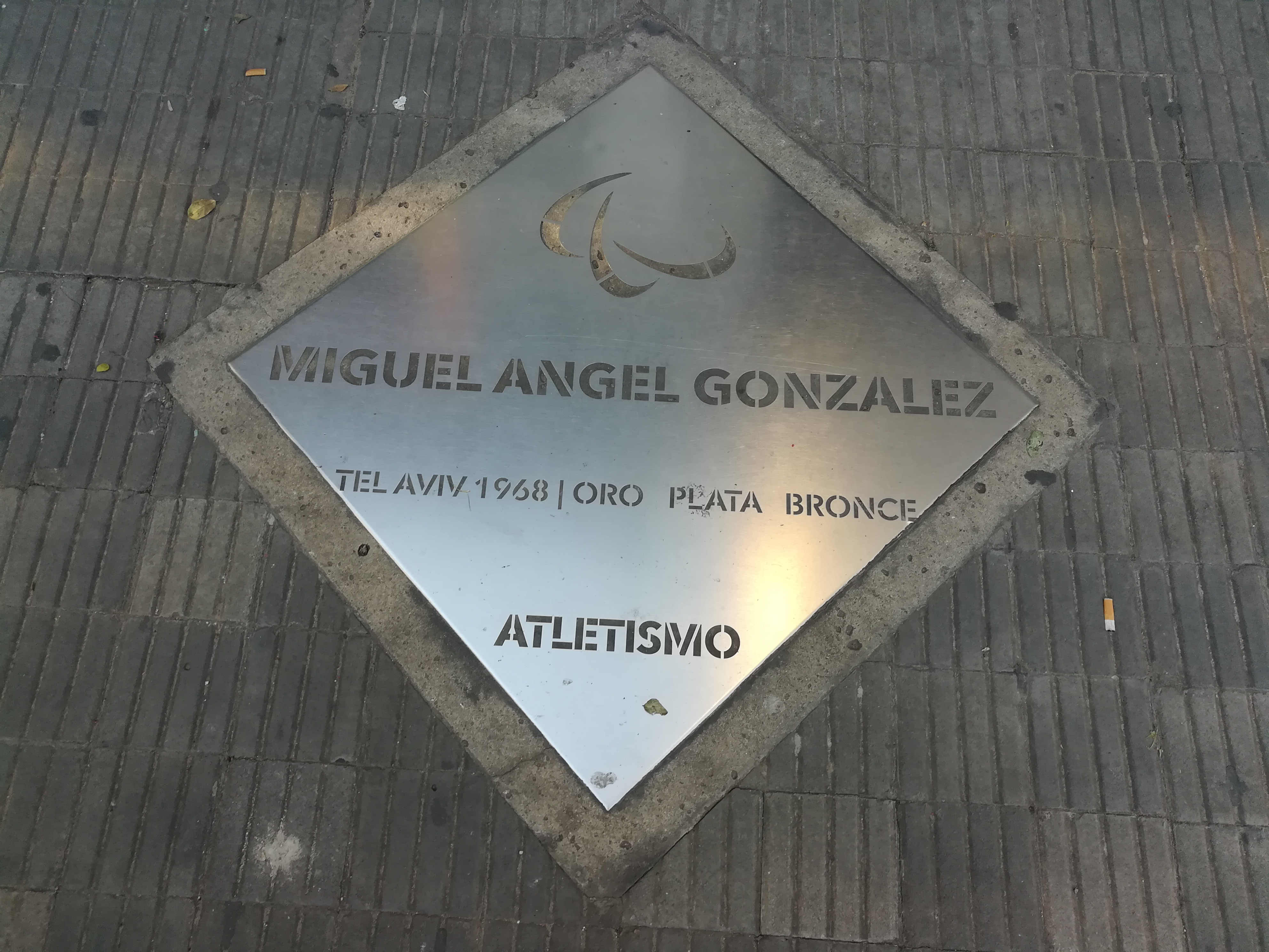 Paseo de los Olímpicos de los en la Avenida Pellegrini (Rosario).